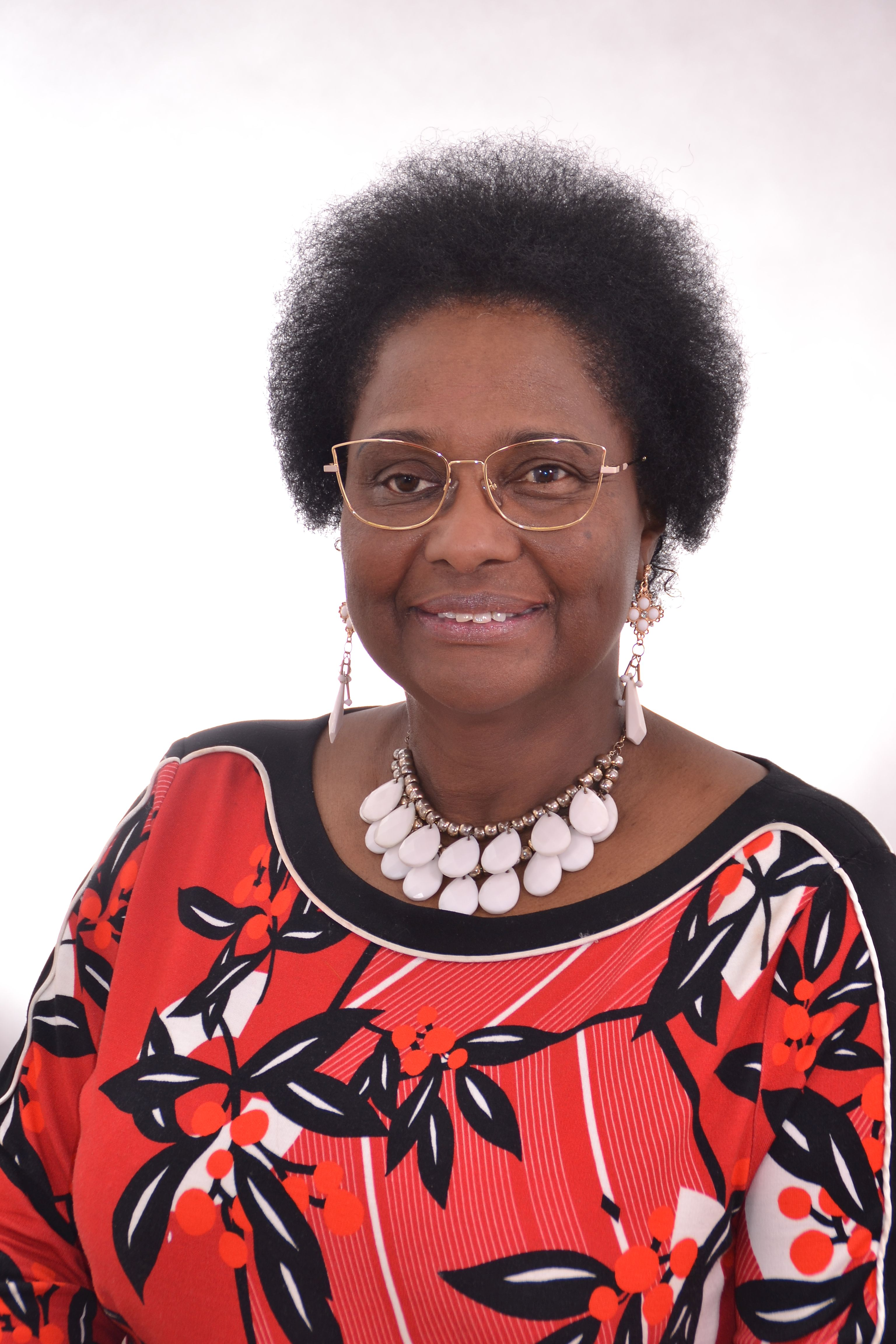 Photo de Dr. PHF